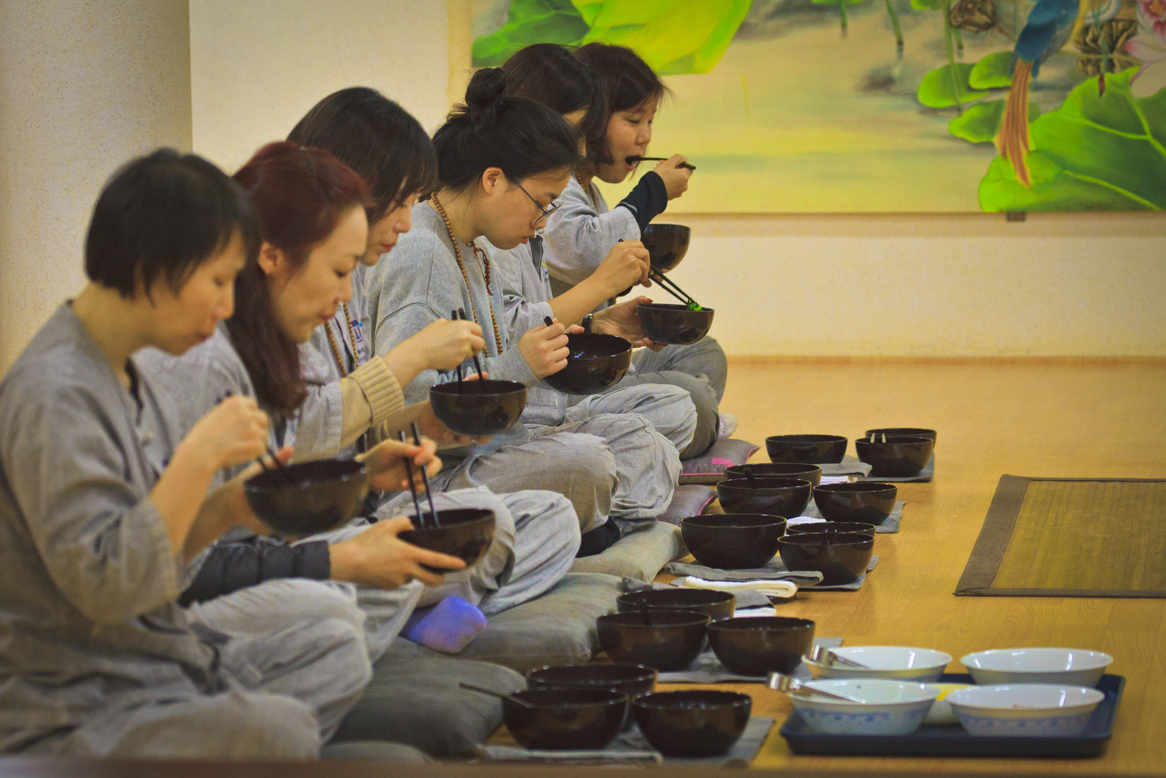 발우공양사진입니다.